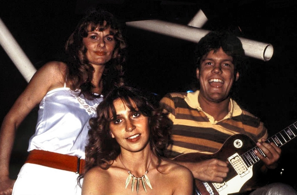 German vocal group "Sunday", 3rd castDeutsche Vokalgruppe „Sunday“, 3. Besetzung. On the right: Dieter Bohlen